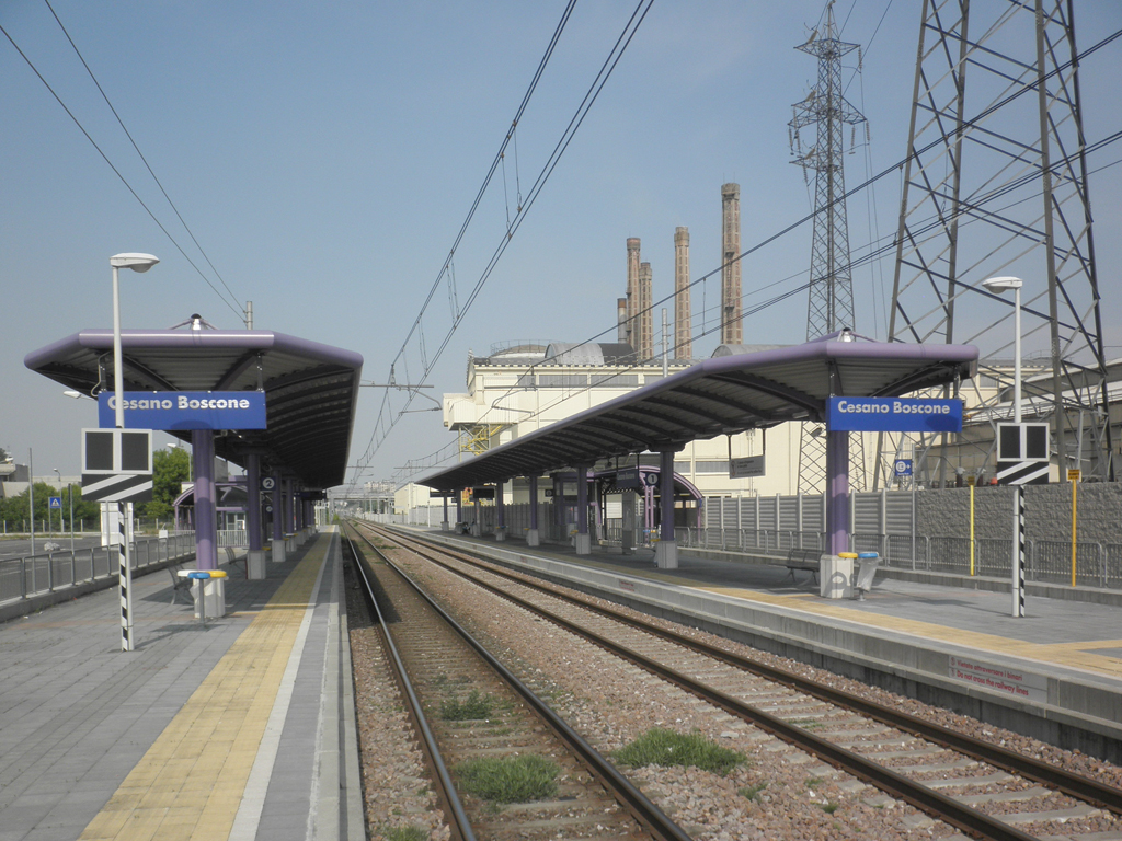 Stazione ferroviaria di Cesano Boscone.